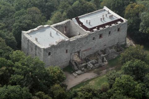 Várgesztes, Hungary, aerialphotgraphy